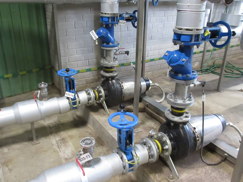 Peilinių sklendžių taikymas nuotekų valykloje